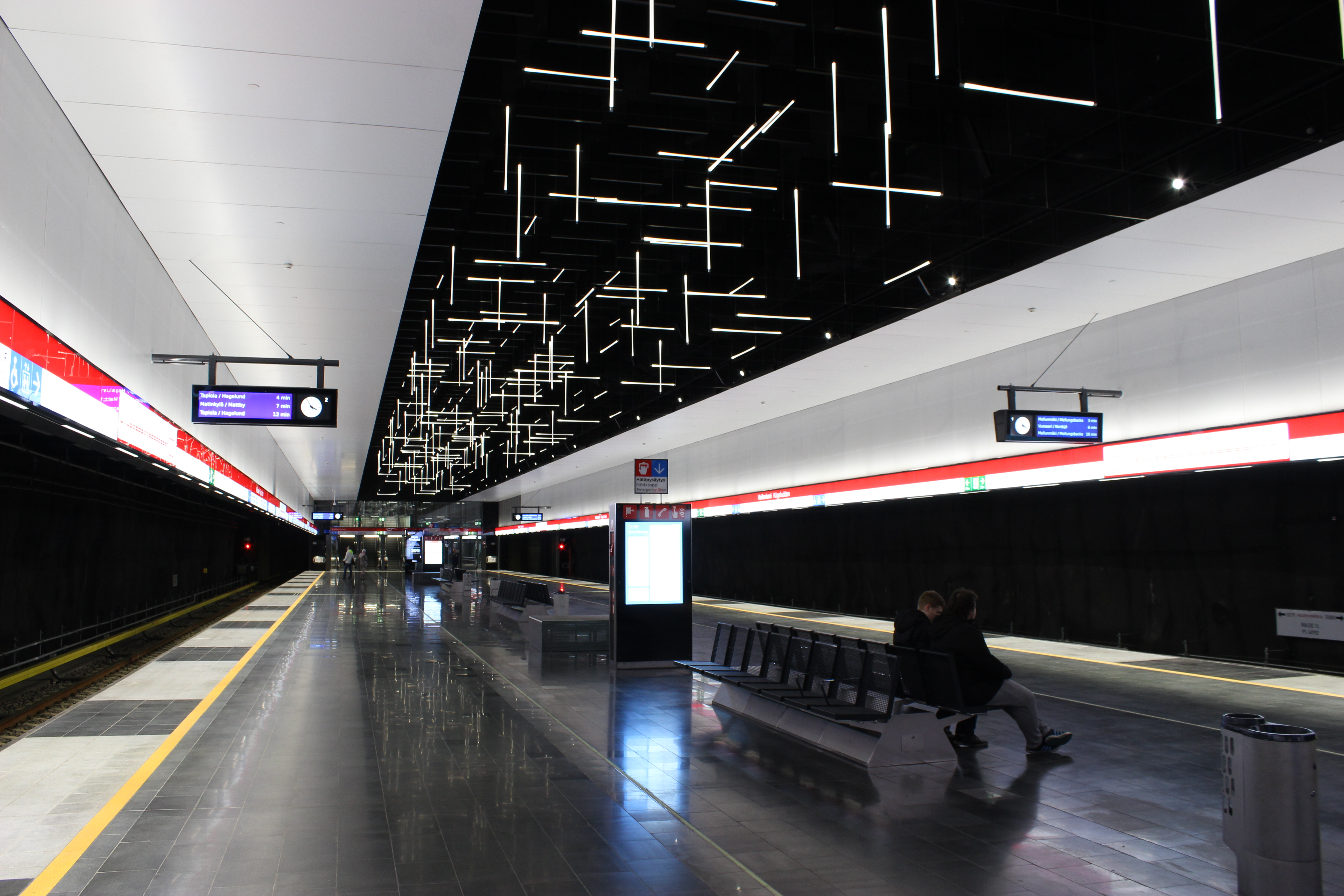 Keilaniemen metroasema marraskuussa 2017.